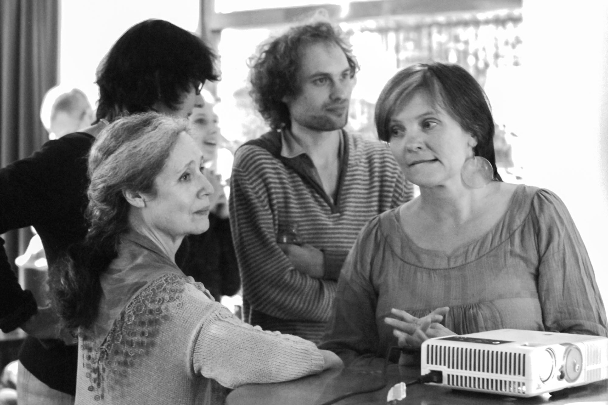 Táňa Fischerová s týmem Klíčového hnutí - sledování výsledků voleb